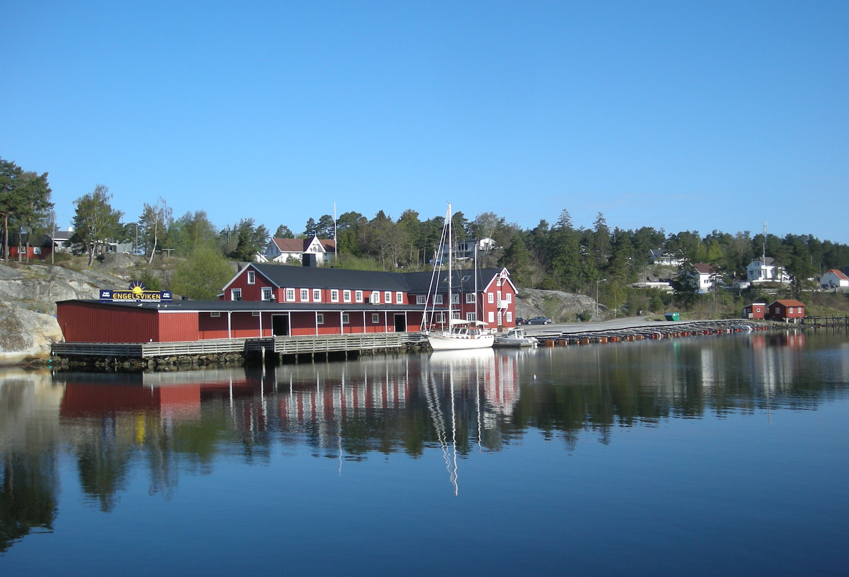 Fra Engelsviken utenfor Fredrikstad